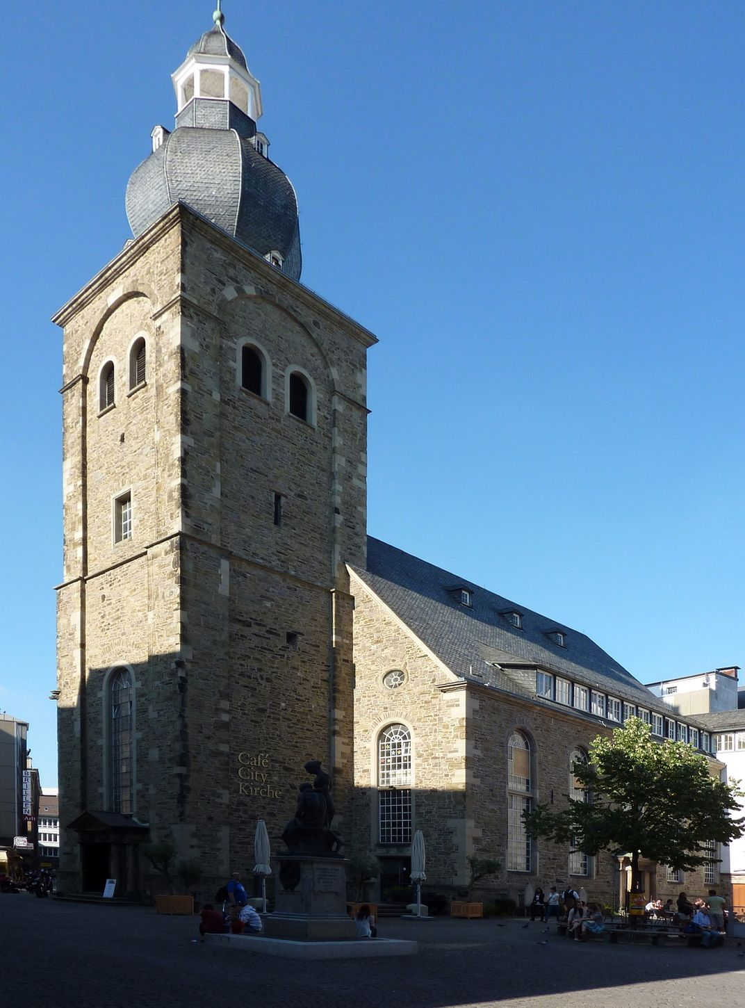 Alte Reformierte Kirche WuppertalThis is a photograph of an architectural monument. 1306